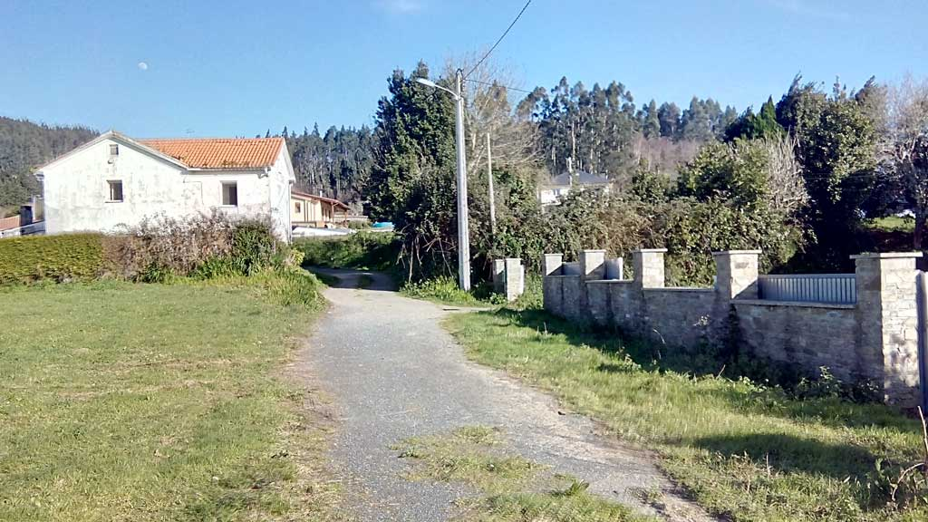 Vista das Salgueiras, Sedes.